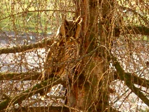 Asio otus Sova pred balkónom panelového domu na sídlisku Sekčov v Prešove